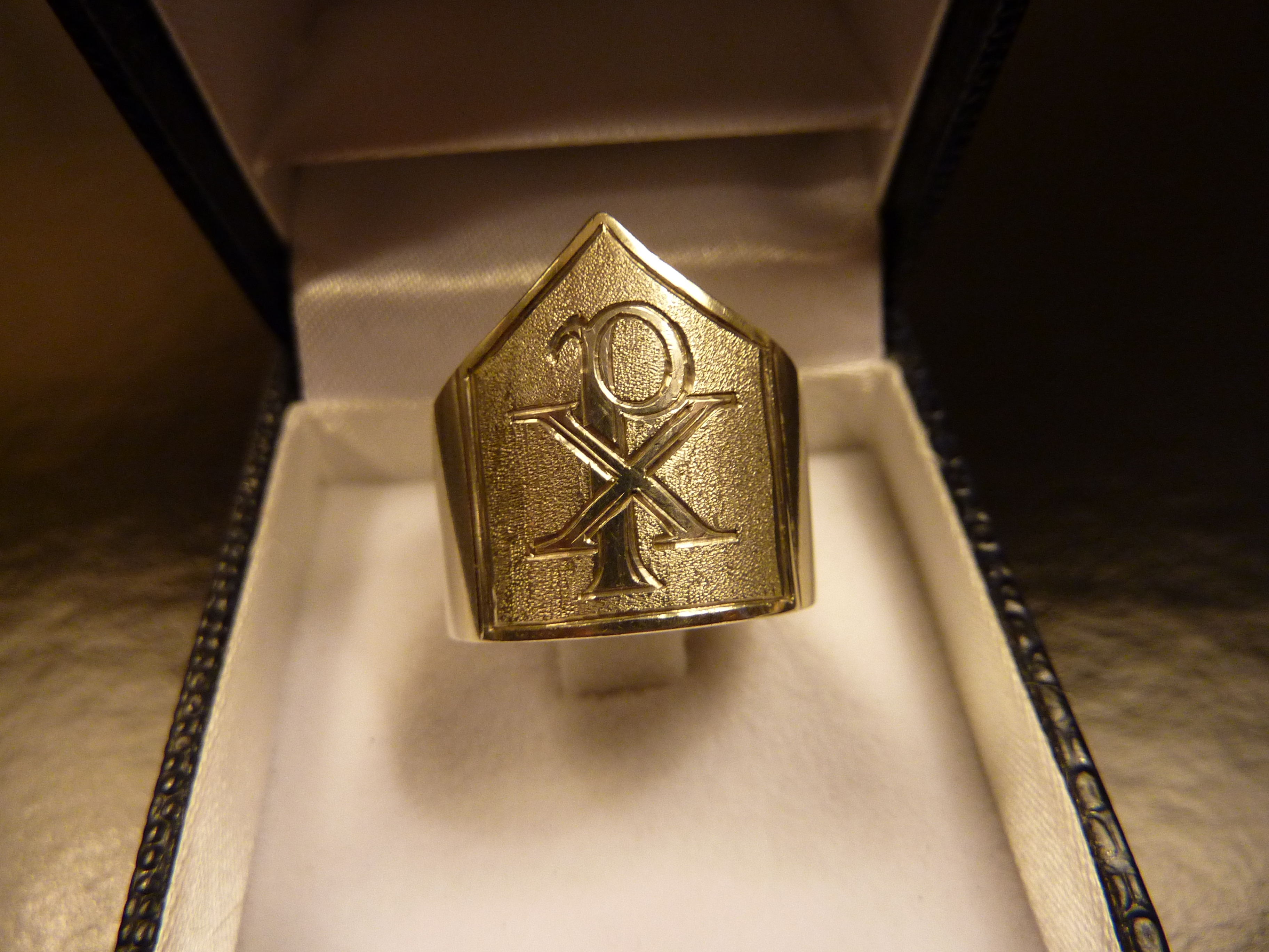 Anneau épiscopal en argent, portant le symbole chrétien primitif du Chrisme : "Chi" et "Rho" superposés, deux premières lettres grecques du mot "χριστός / christós"